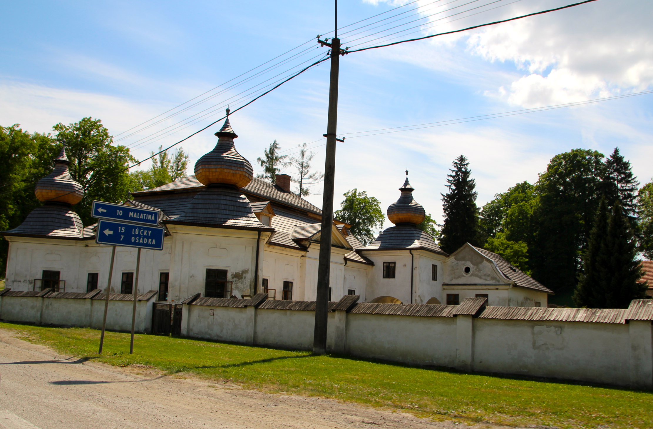 Vyšný Kubín - wieś i gmina w północnej Słowacji, w powiecie Dolny Kubin.